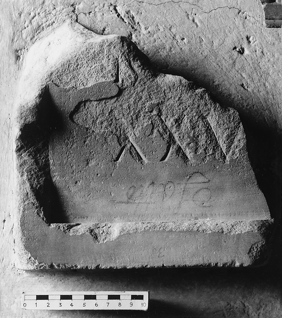 Уламок напису з бази скульптури Капіса Сільвія на Форумі Августа